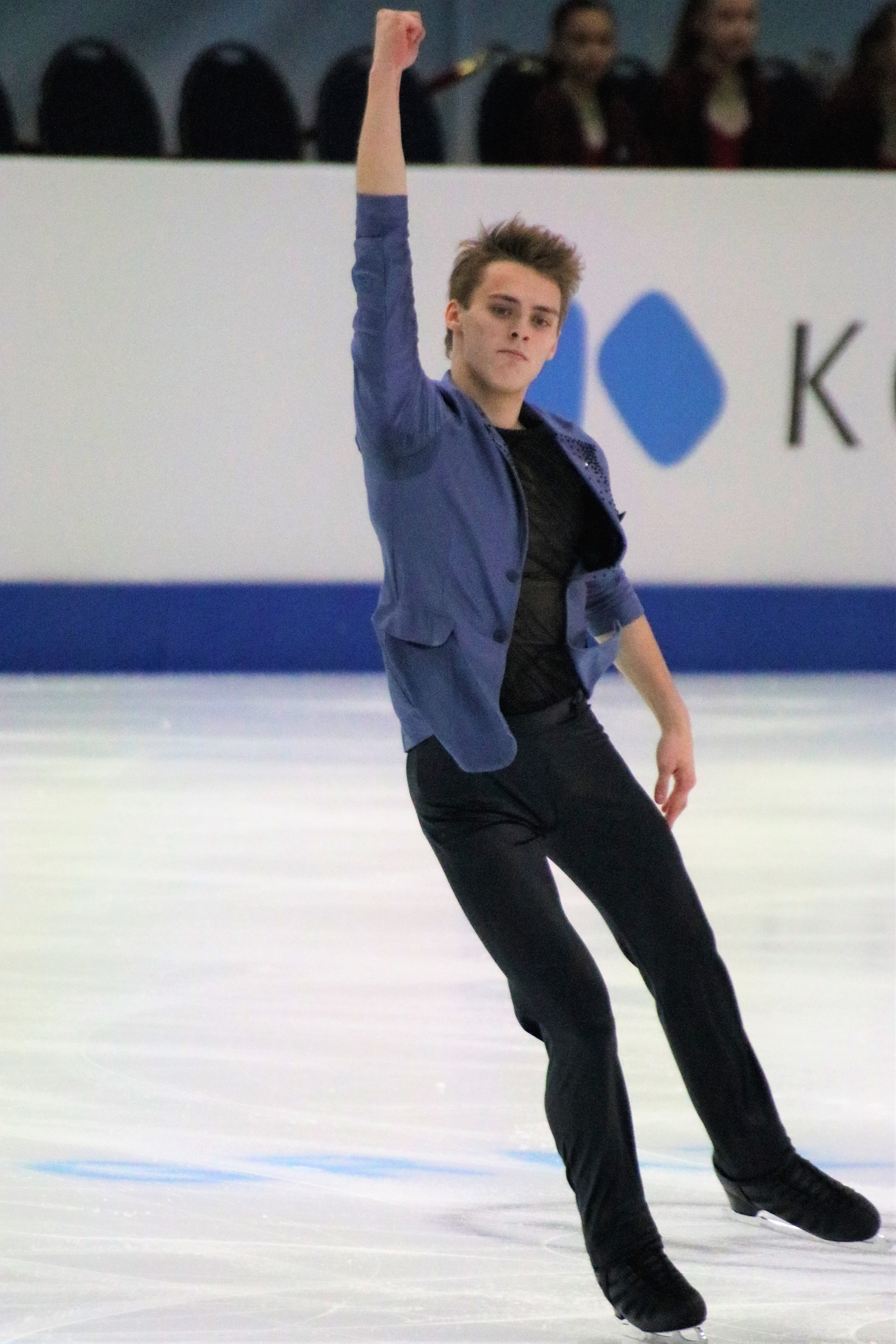 Александр Селевко (Эстония) на чемпионате Европы по фигурному катанию 2020